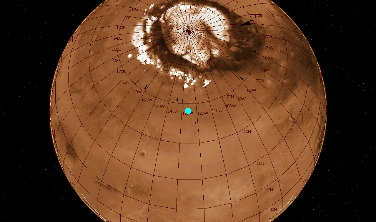 Mars Phoenix lander landing site